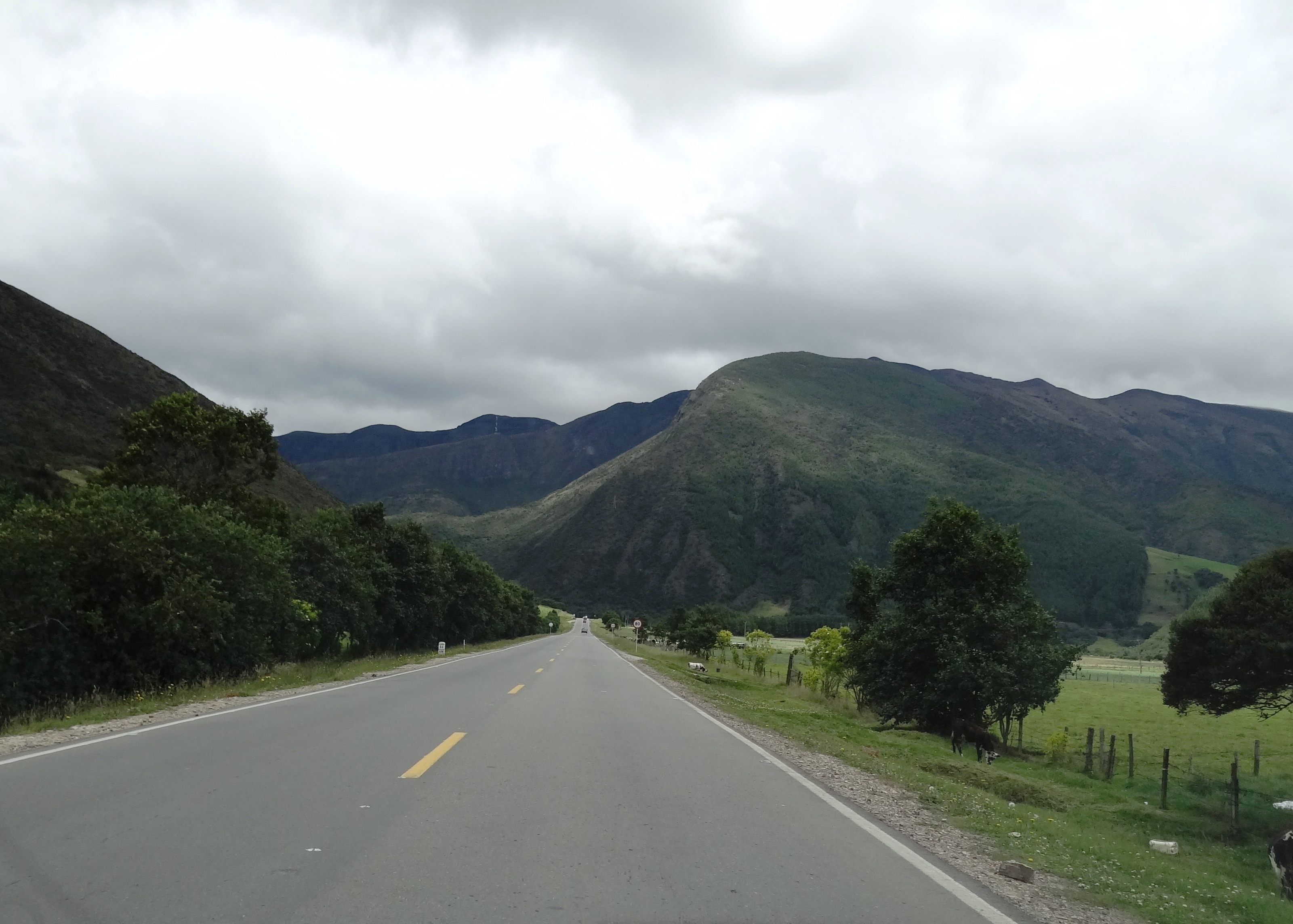 Ruta Nacional 62, en inmediaciones al municipio de Arcabuco, departamento de Boyacá, Colombia.